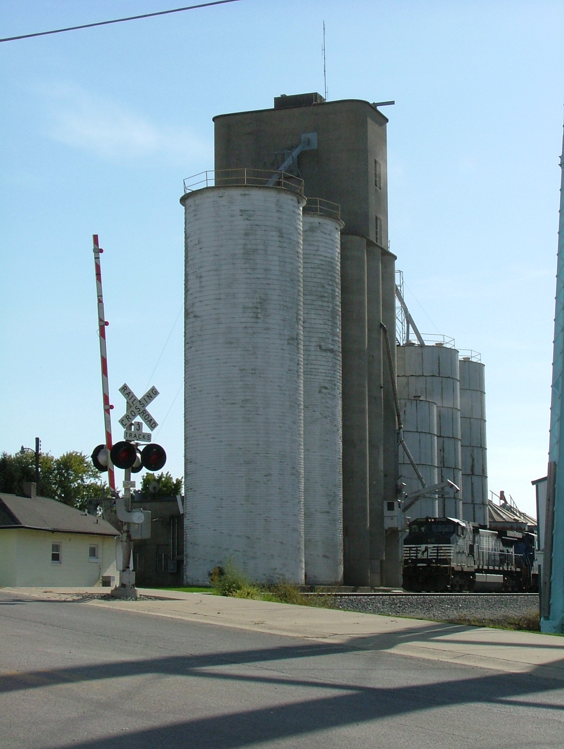 Grain elevator in Catlin, Illinois